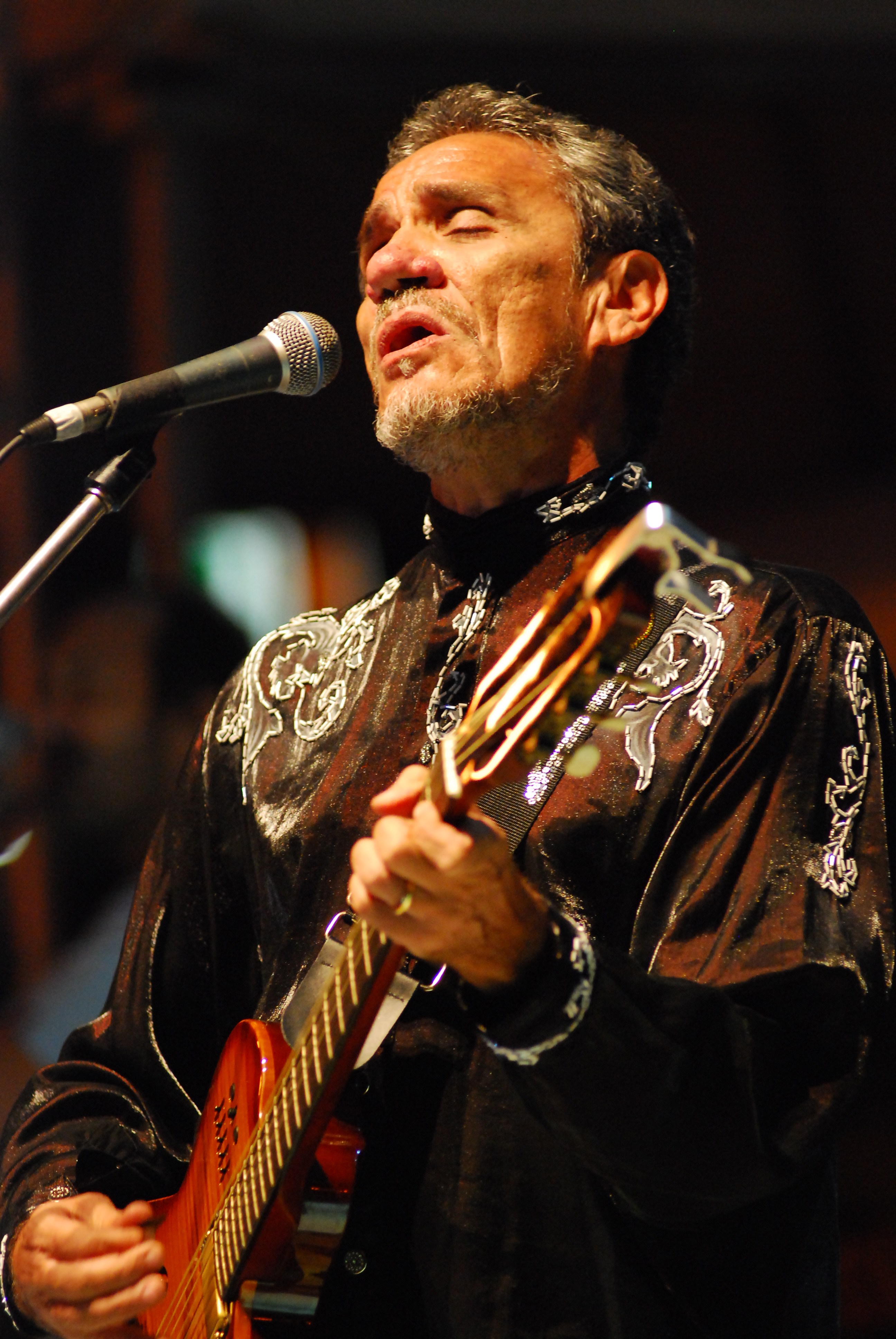 Foto: Silvio Tanaka